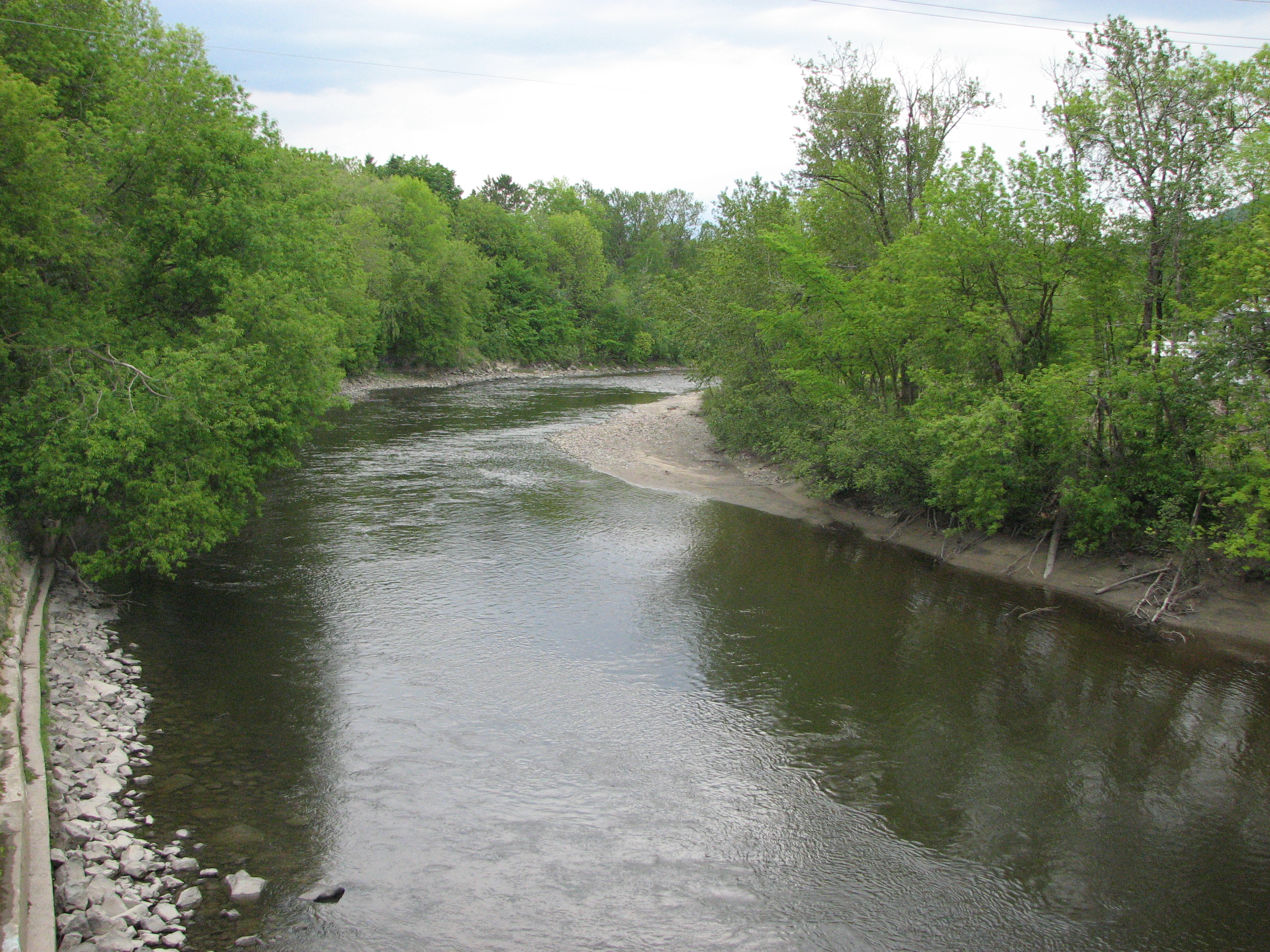 Rivière du Gouffre à Baie-Saint-Paul